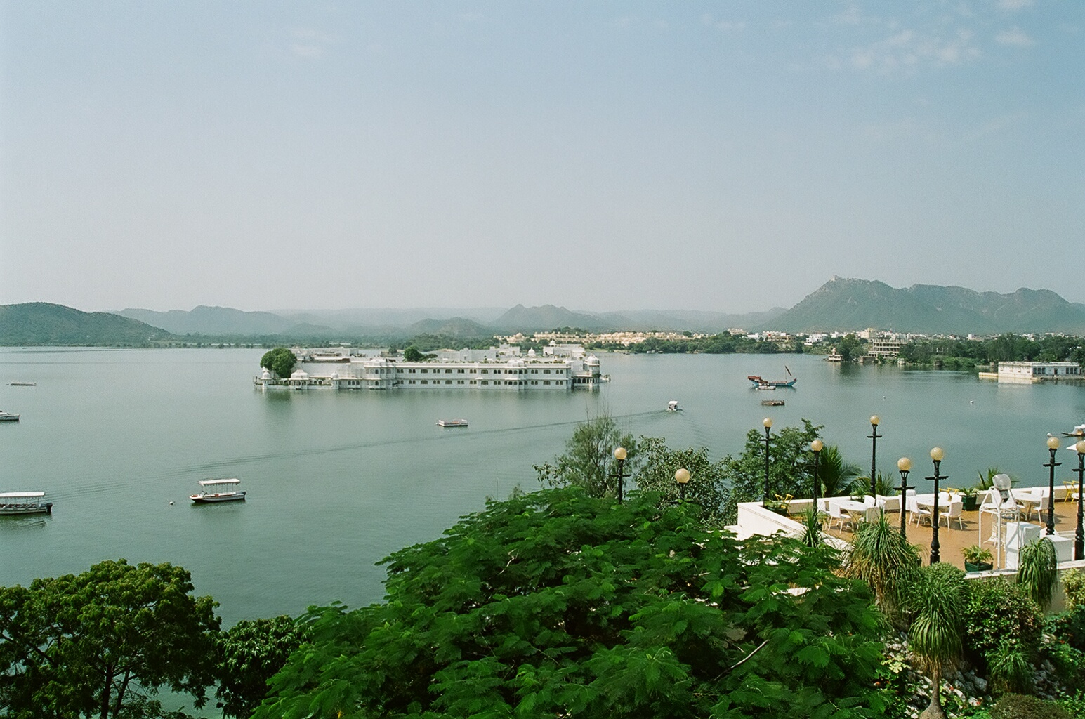 Lake Pichola in Udaipur, India